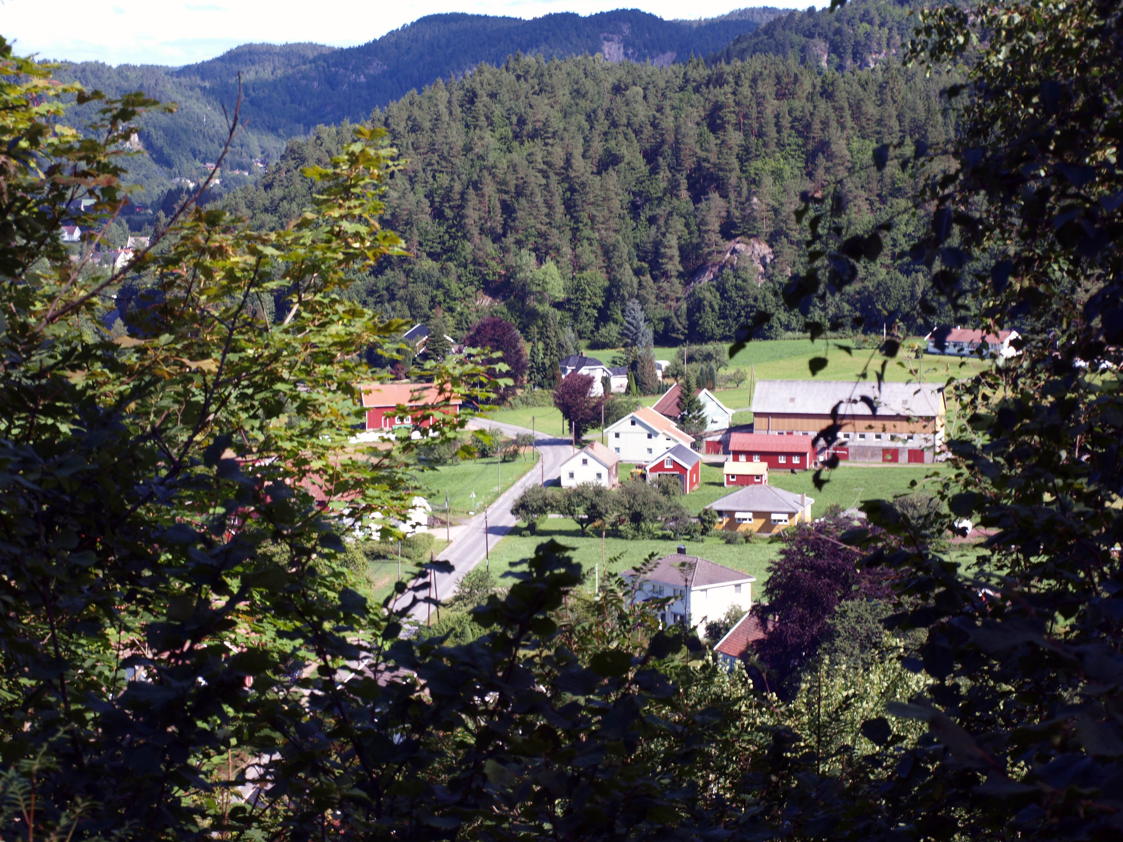 Skofteland i Lindesnes kommune